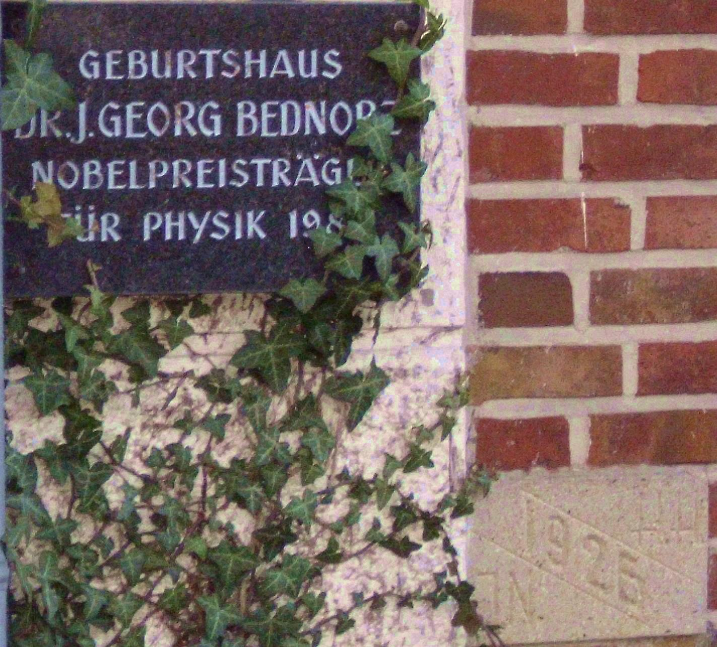 Gedenktafel am Geburtshaus von Georg Bednorz (Physik-Nobelpreis-Träger 1987) in Neuenkirchen (Kreis Steinfurt)